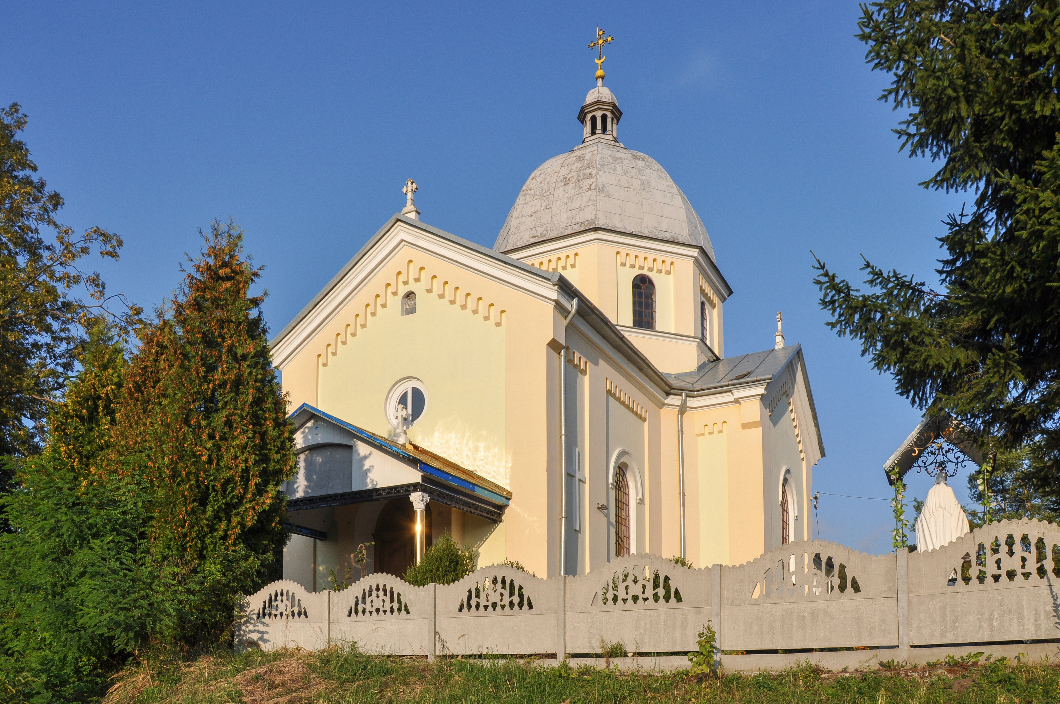 Церква Пресвятої Трійці, с. Стоки